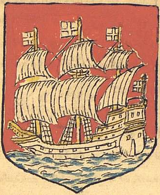 Plus ancienne représentation du blason de Thiers, Pierre de La Planche, 1669